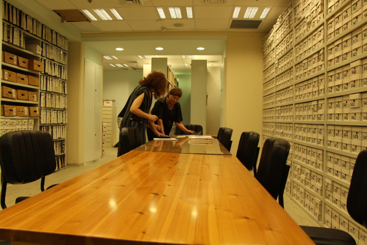 מחסן מכון גנזים